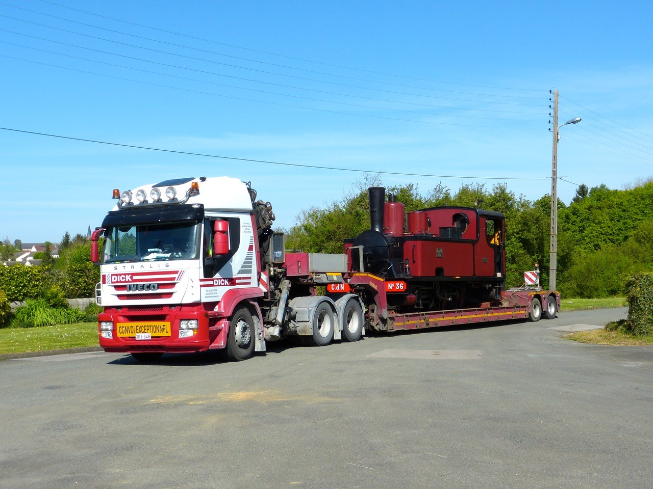 Arrivée de la locomotive Lulu (CDN 36) à Crèvecoeur